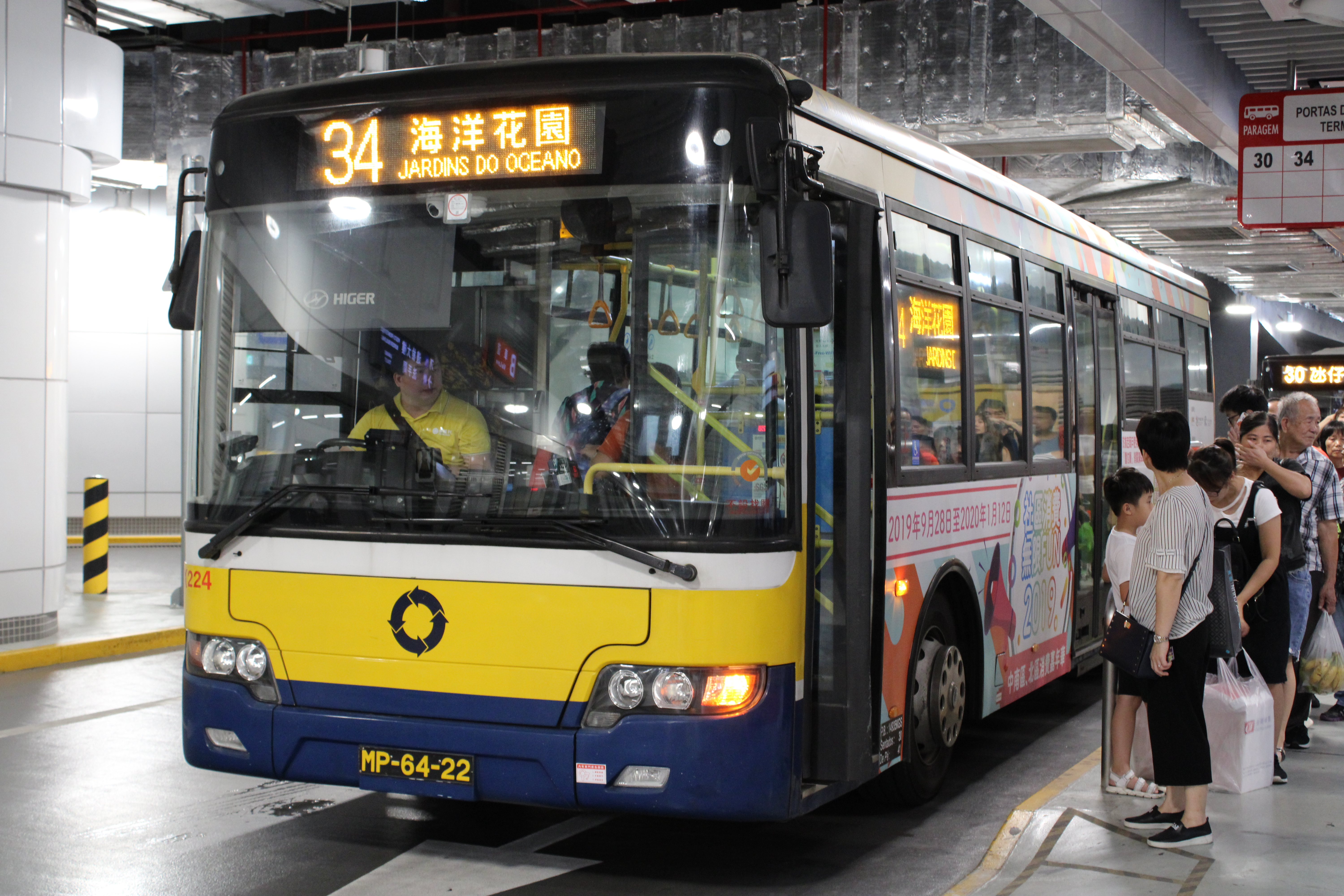 新福利蘇州金龍KLQ6108GQ28行駛34路線。